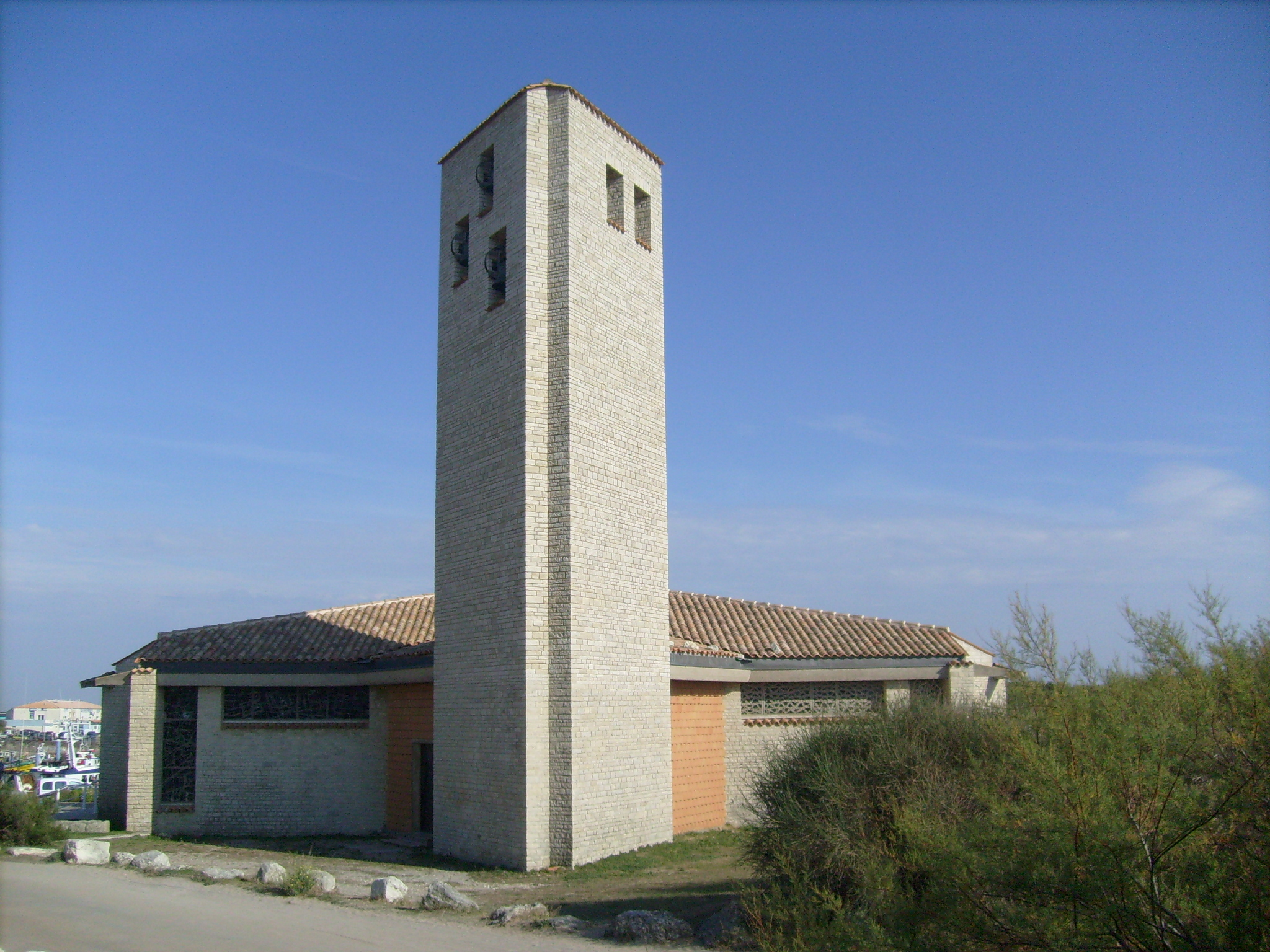 Eglise de la Cotinière